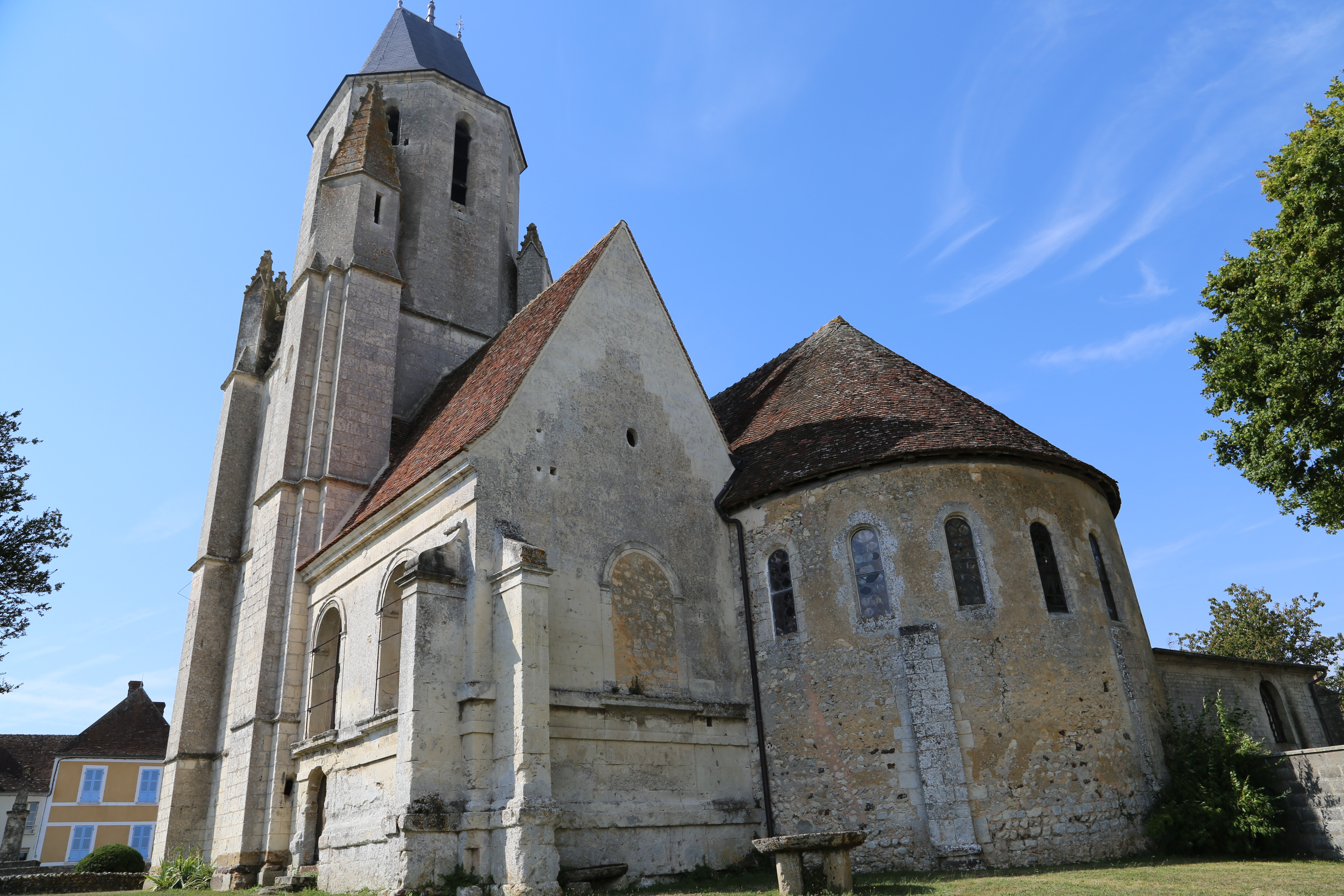 Vue extérieur du choeur, de la chapelle Saint Jean et du clocher de l'Eglise Saint Pierre. Inscrite à l'inventaire supplémentaire des Monuments Historiques. Sur un des contrefort, un cadran solaire est daté de 1633. Sur le côté droit extérieur de l'église, a été enchâssée l'épitaphe composée par Delisle pour son ami Dureau de la Malle (1742-1807), seul vestige du mausolée qui lui avait été édifié d'après des dessins de Girodet.